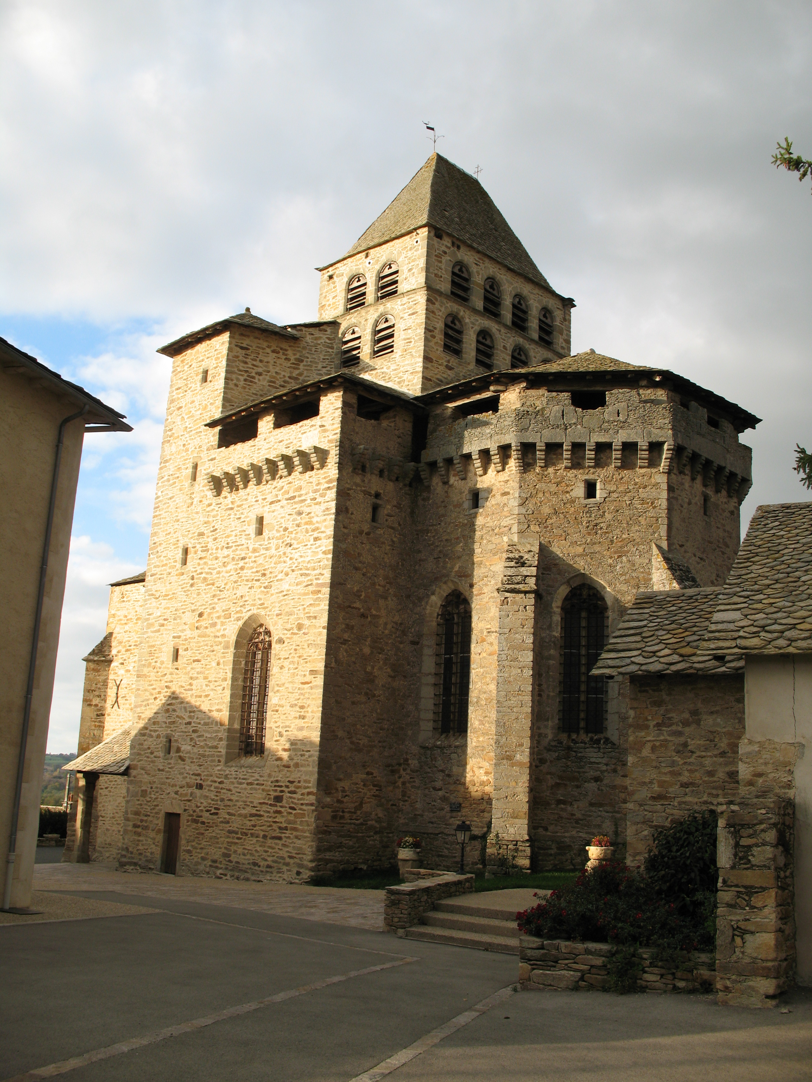 vue générale de Boussac (Aveyron) et de l'église fortifiée Notre-Dame-de-l'Assomption